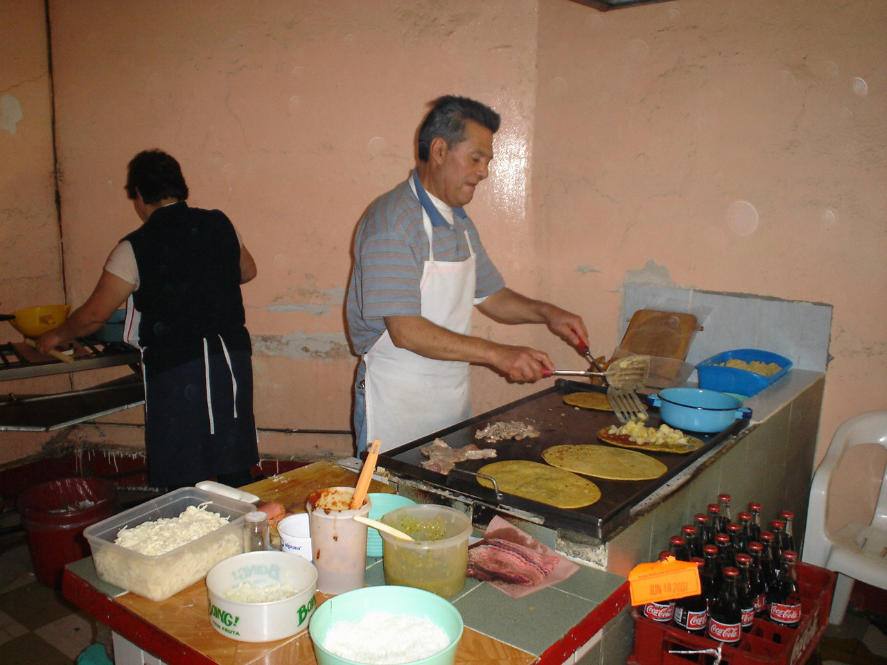 TIPICO LUGAR DONDE SE COMEN QUESADILLAS, SOPES Y HUARACHES